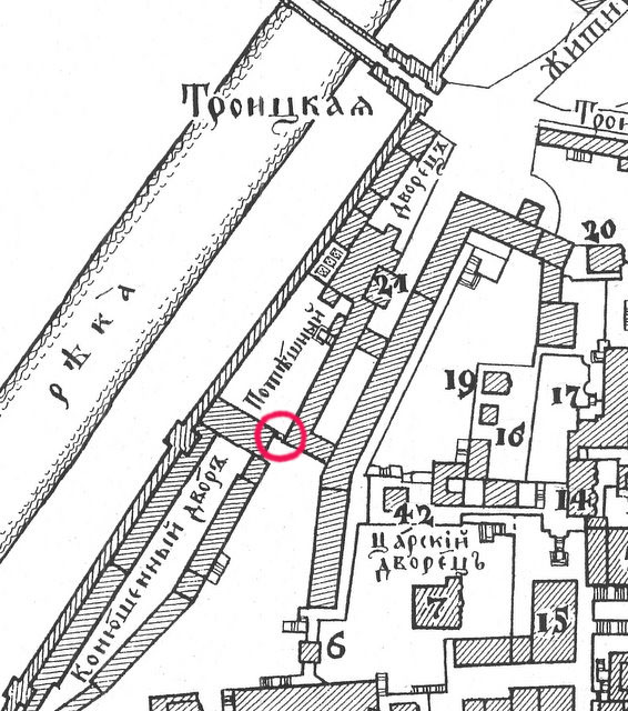 Красным кругом обозначено место нахождения Львиных ворот в Московском Кремле в XVII веке.